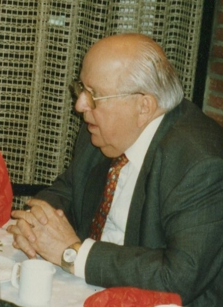 Porträt Prof. Wolfgang Jäger, ehemals Hörfunkdirektor des NDR